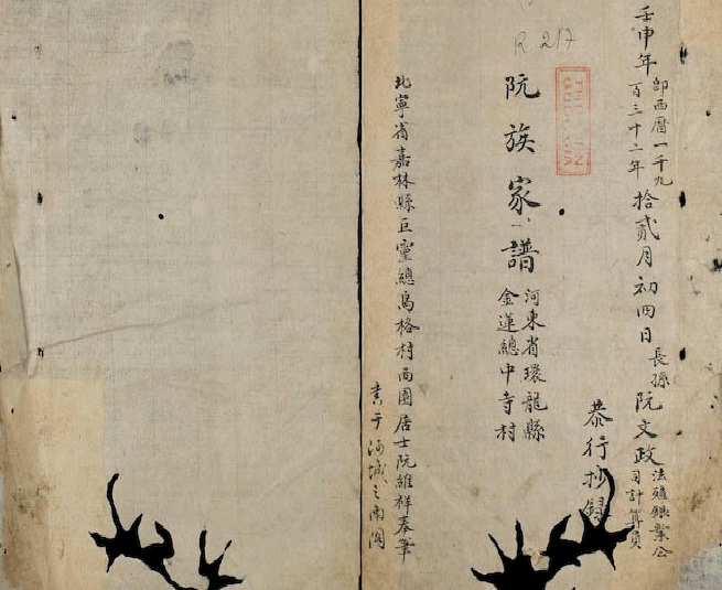 Gia pha dong ho Nguyen Dong Tac